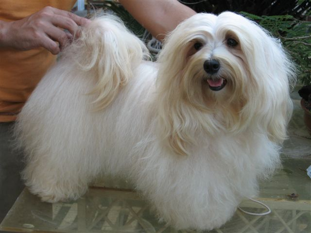 Echale slsita Rumba